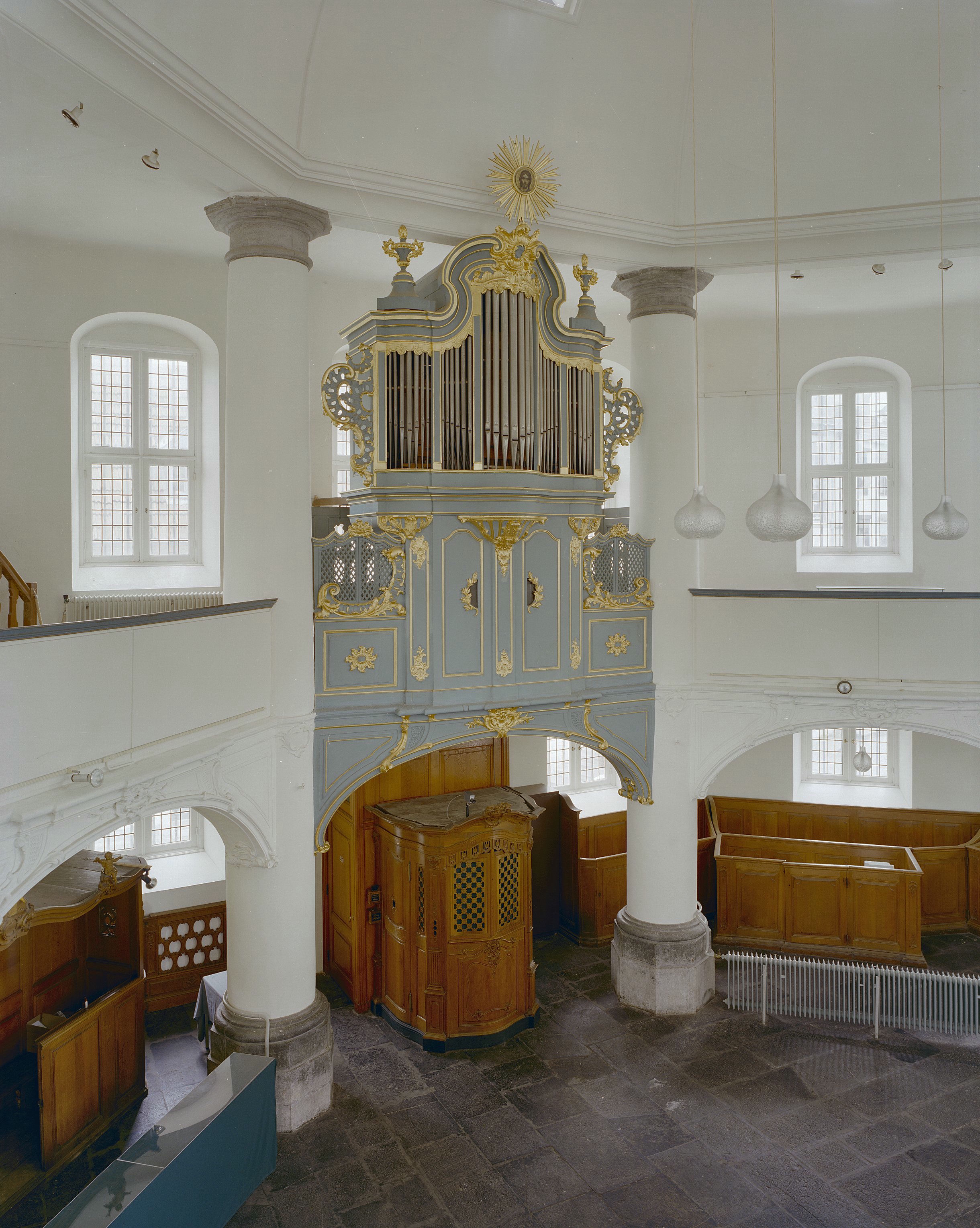 Voormalige Evangelisch Lutherse Kerk: Interieur, aanzicht orgel, orgelnummer 1532 (opmerking: Gefotografeerd voor Het Historische Orgel in Nederland 1726-1769, bladzijder 343)